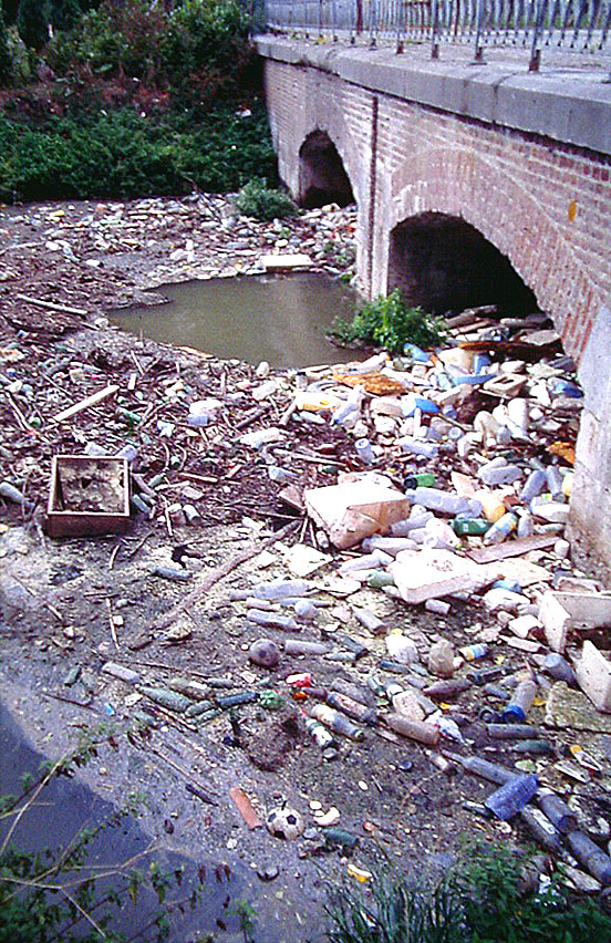 Accumulation de macro-déchets flottants en amont du siphon qui fait passer l'Aa sous le Canal de Noeufossé à Arques. Dans la décennie 1985/1995, l'Aa a subi une lourde pollution chronique d'origine industrielle (3 papeteries et d'autres usines) et urbaine (peu de station d'épuration ou station dysfonctionnant).